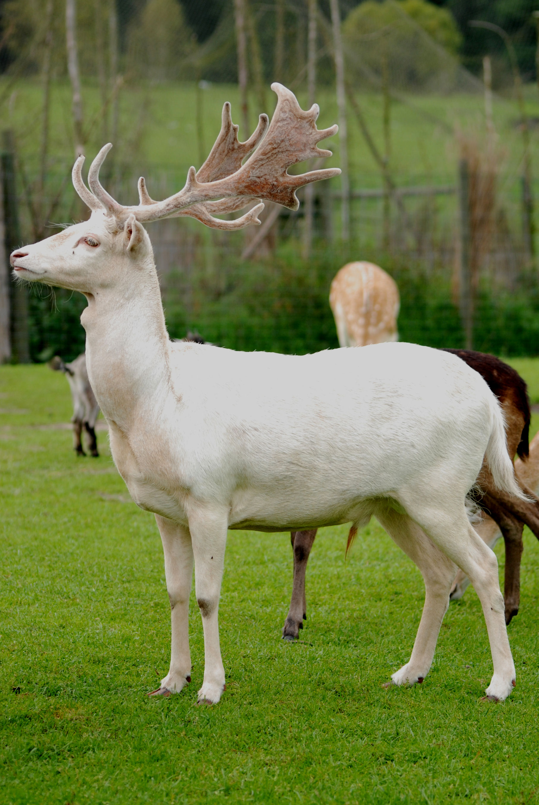 Dama dama in Kadzidłowo